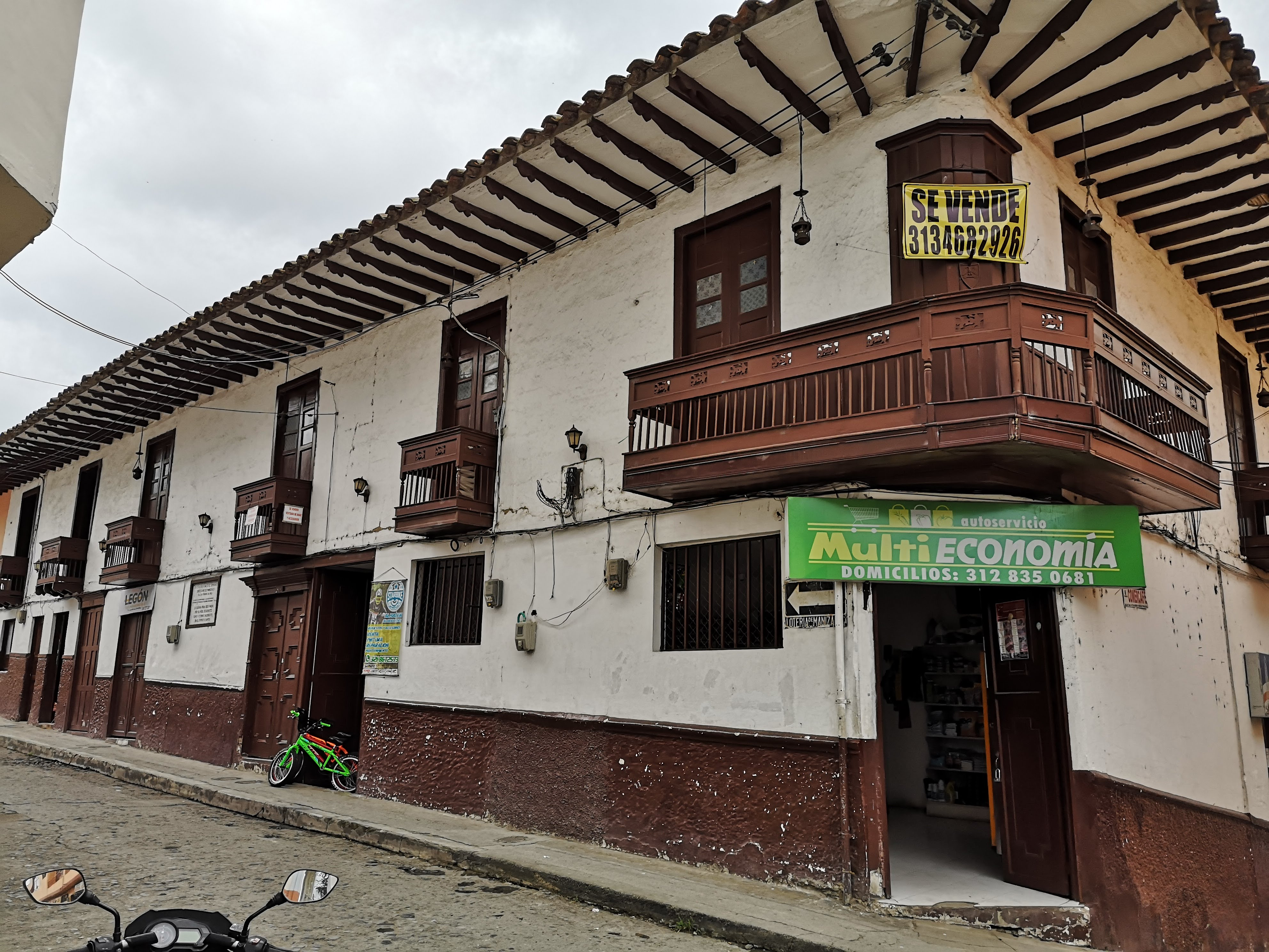 Fachada de la Casa del antiguo Seminario Diocesano de Manizales, en el municipio de Aranzazu